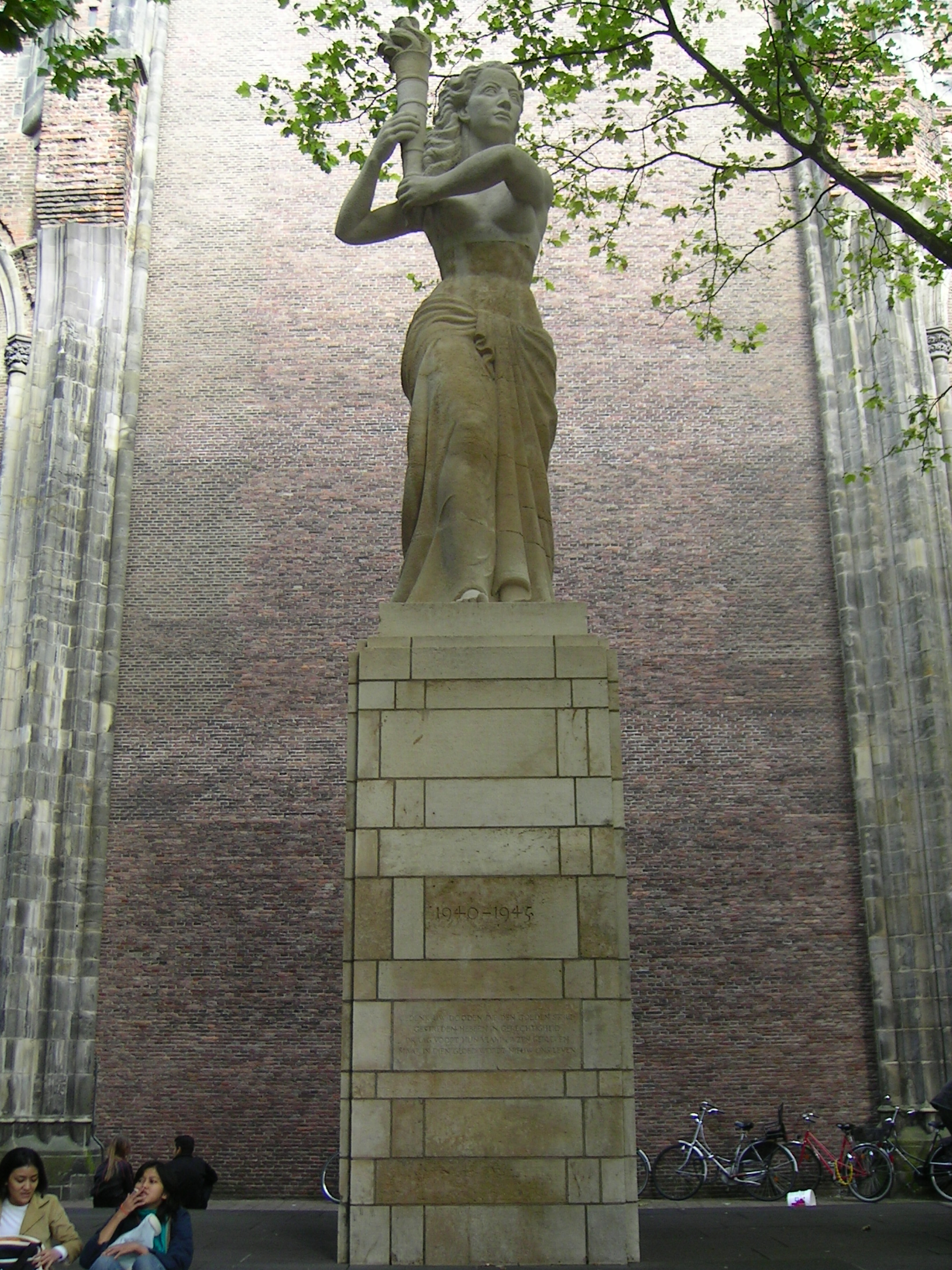 Mahnmal in der Nähe des Doms in Utrecht, welches an den Zweiten Weltkrieg erinnern soll.